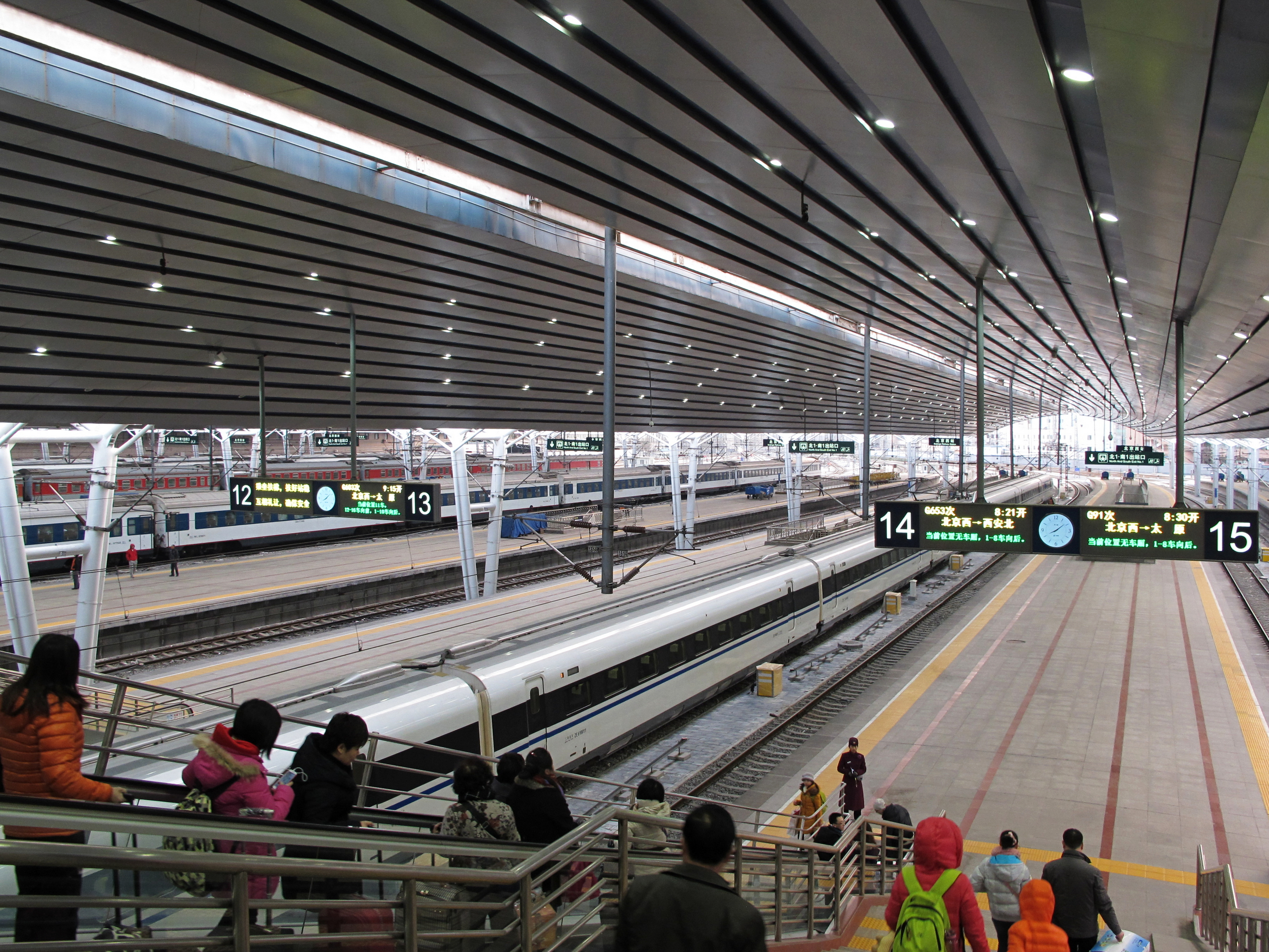 中文（中国大陆）: 北京西站站台